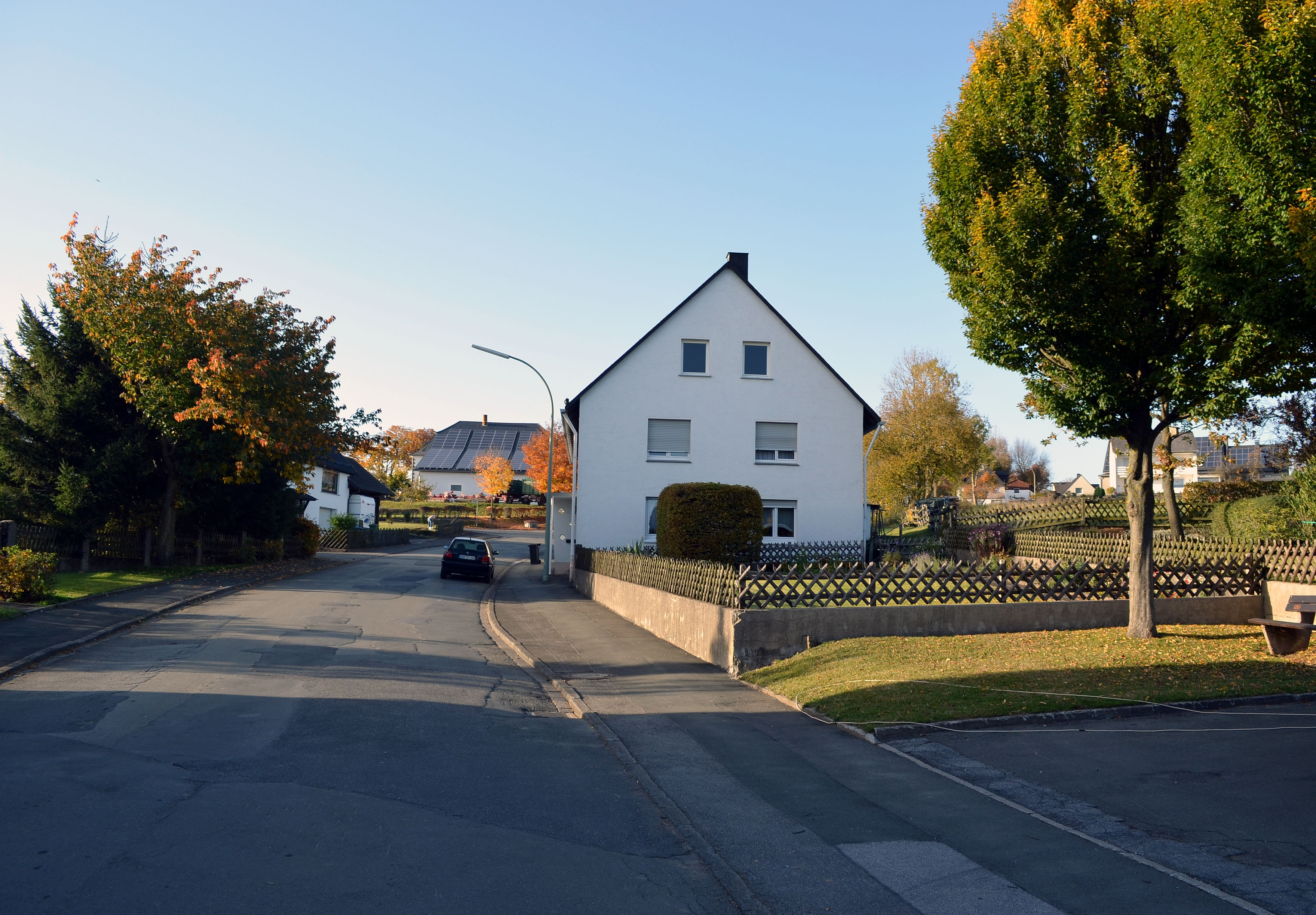 Brilon, Wülfte, Ortsansicht 2